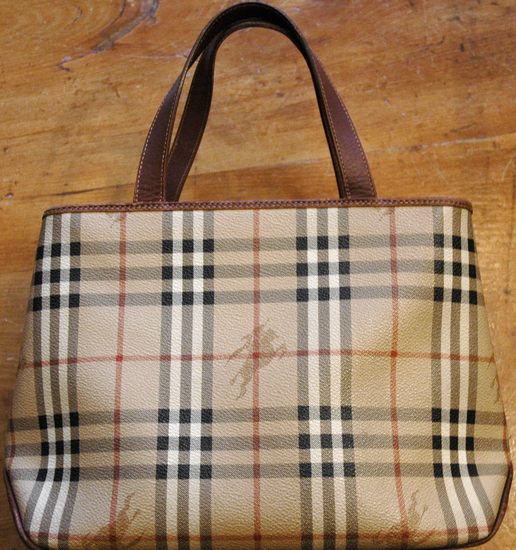 A ladies' Burberry handbag.